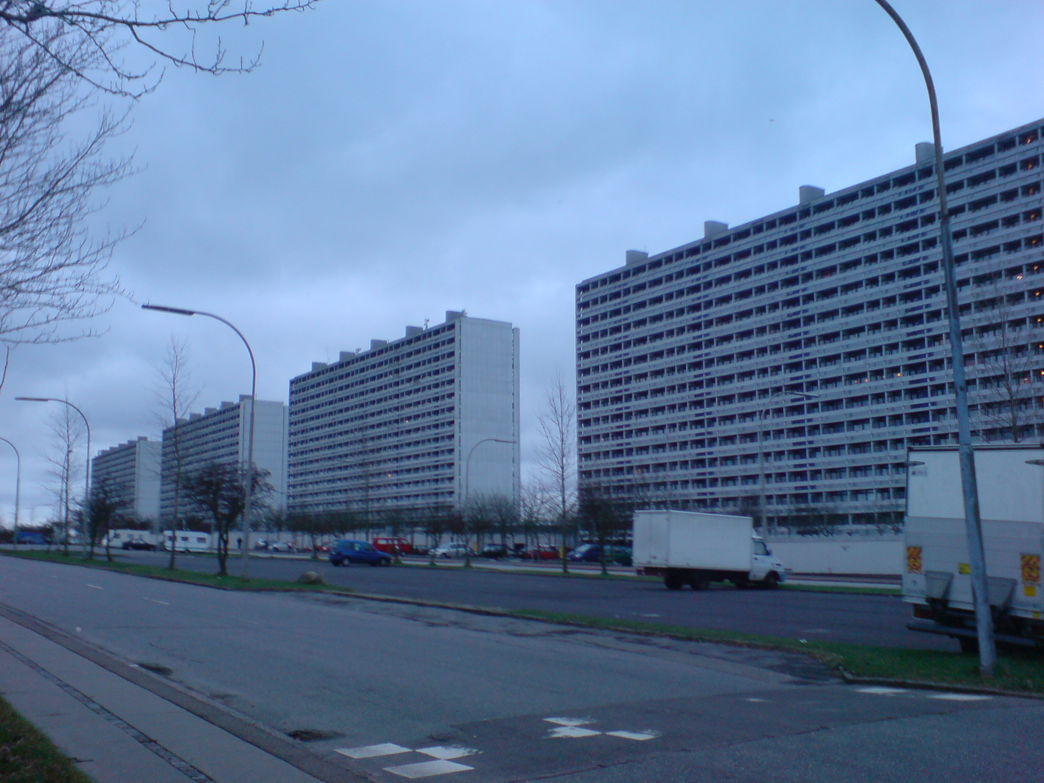 Højhusene Høje Gladsaxe set fra Gladsaxevej